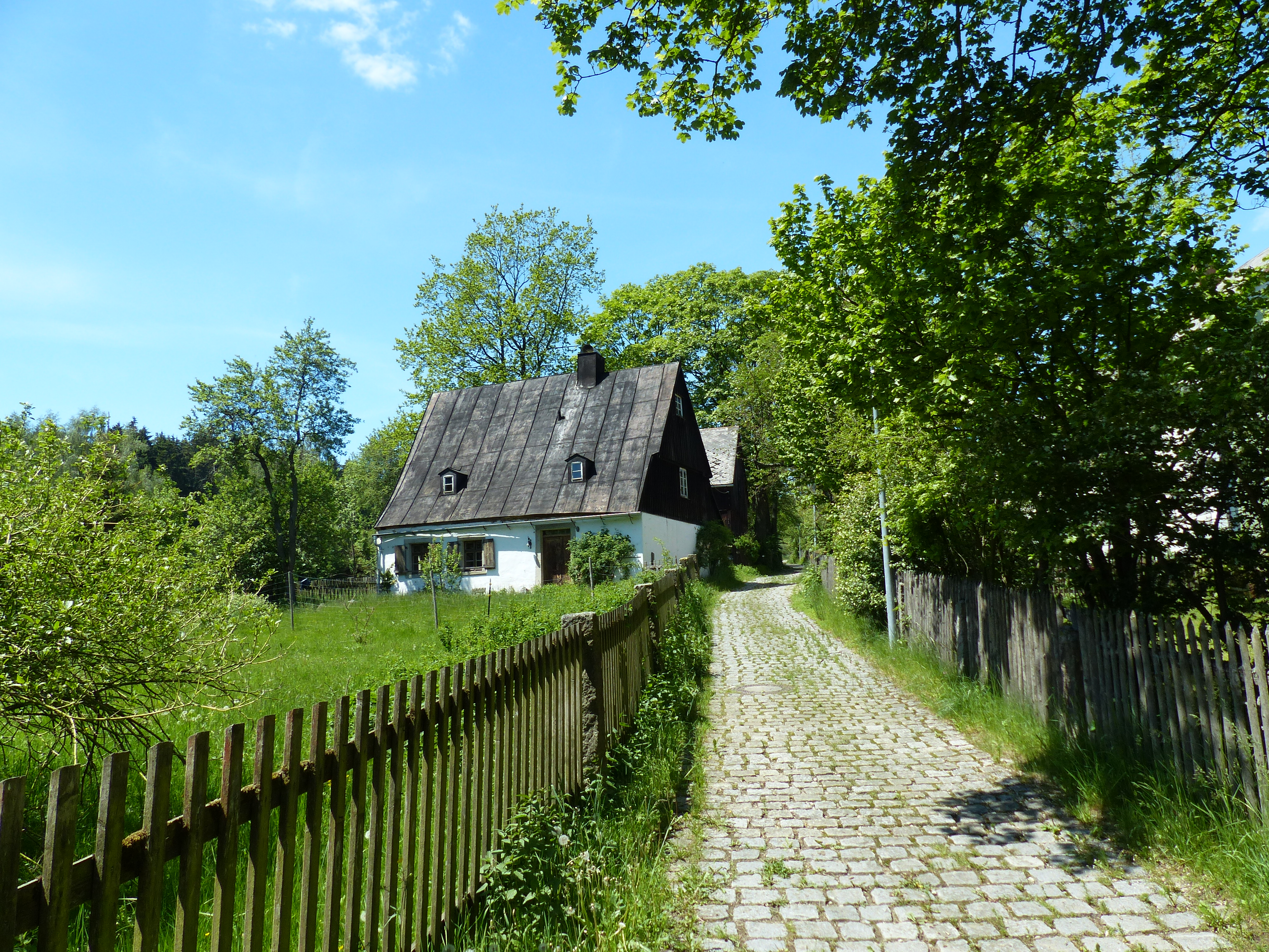 Kleinwendern